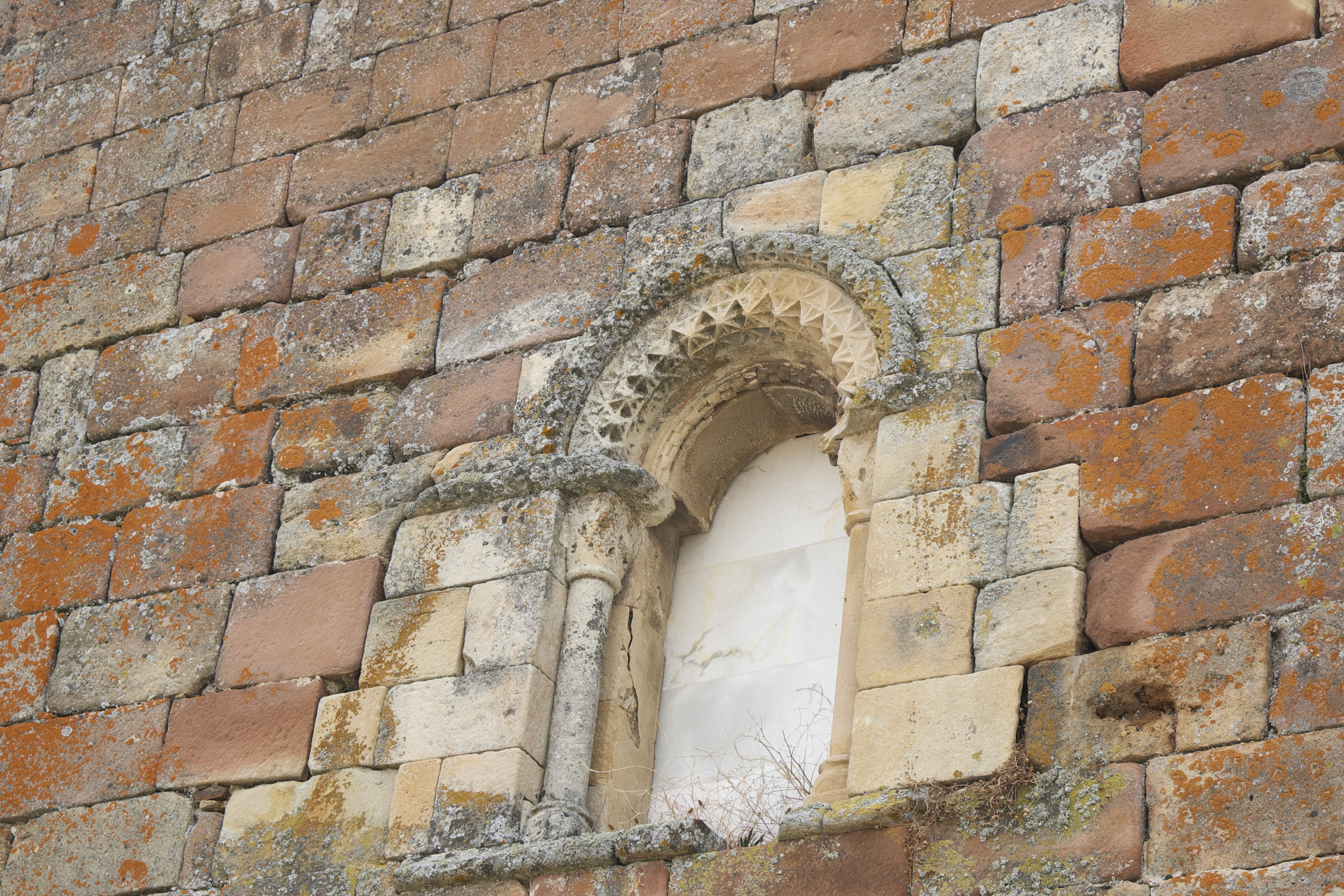 Kirche San Cornelio y San Cipriano in San Cebrián de Mudá in der Provinz Palencia (Kastilien-León/Spanien), Rundbogenfenster der Westfassade